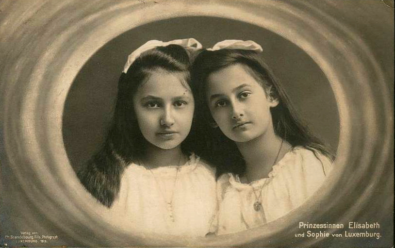 D'Prinzessinnen Elisabeth (1901-1950 a Sophie (1902-1941). Op der Foto steet Verlag von Ch. Brandebourg Fils,Photograph. Luxemburg 1913. Den Auteur ass deemno kaum de Charles Brandebourg selwer, dee jo 1906 gestuerwen ass.